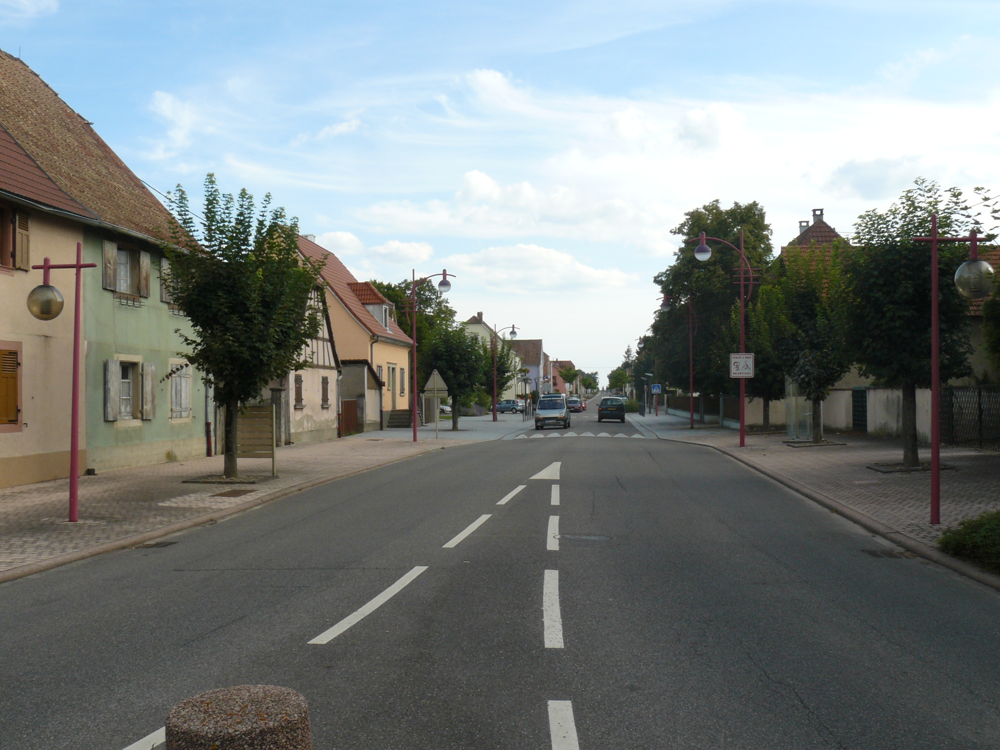 Artère principal de Kunheim